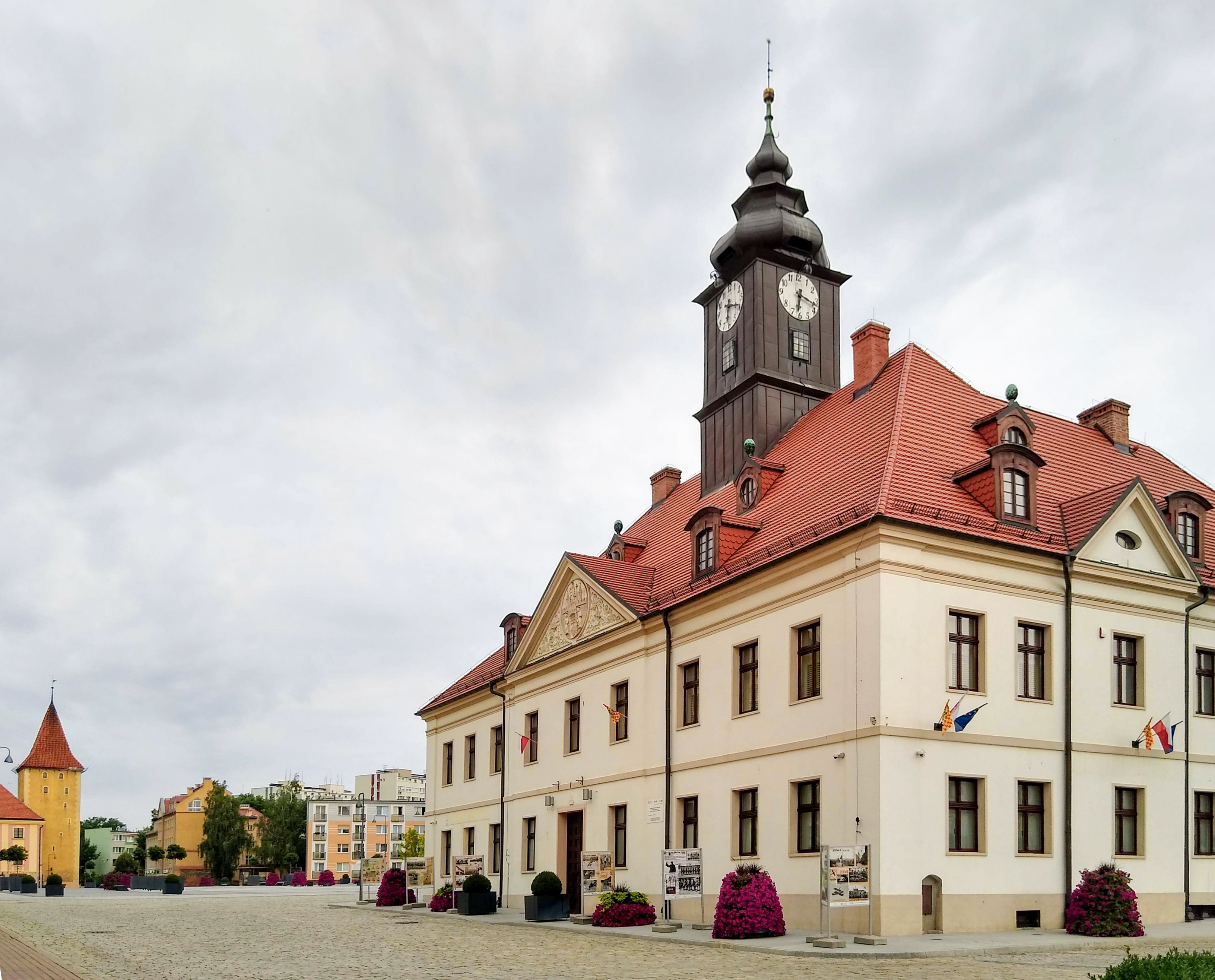 Ratusz na Rynku w Lubinie